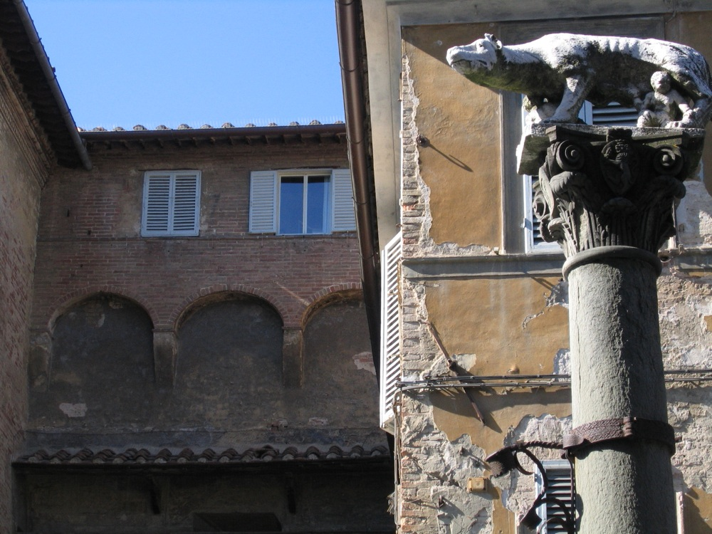 Lupa, Siena, Italia